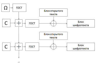 Схема режима гаммирования ГОСТ 28147-89